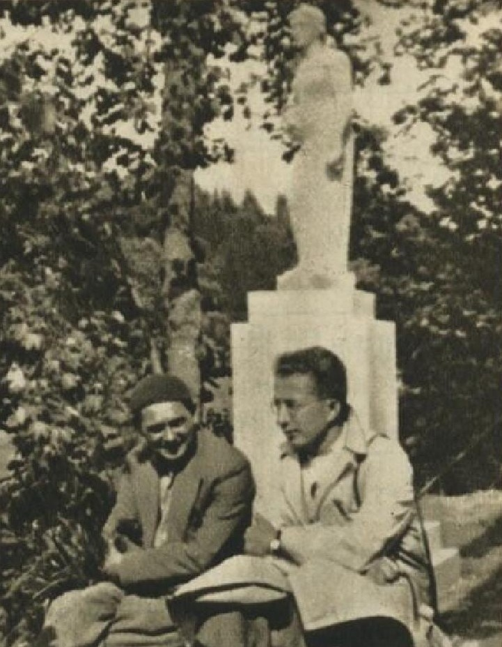 Jan Šnobr (1901-1989), český básník, literární historik a kritik, bibliograf a editor